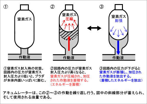 アキュムレータの作動原理